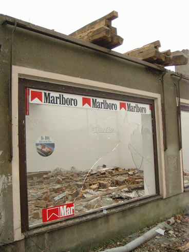 Der ehemalige Supermarkt in Horno